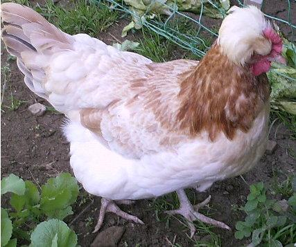 Das ist das Bild meiner Sulmtalerhenne.